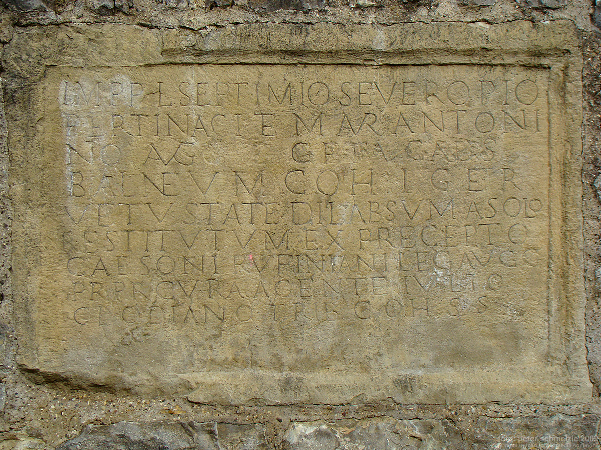 Die 1995 erstmals veröffentlichten Bauinschrift des Kastells Jagsthausen (AE 1995, 1165: Impp(eratoribus) L(ucio) Septimio Severo Pio / Pertinaci et M(arco) Aur(elio) Antoni/no Augg(ustis) et Geta(e) Caes(ari) / balneum coh(ortis) I Ger(manorum) / vetustate dilabsum a solo / restitutum ex precepto / Caesoni Rufiniani leg(ati) Augg(ustorum) / pr(o) pr(aetore) cura agente Iulio / Clodiano trib(uno) coh(ortis) s(upra) s(criptae)). Abguss im Römerbad Jagsthausen.